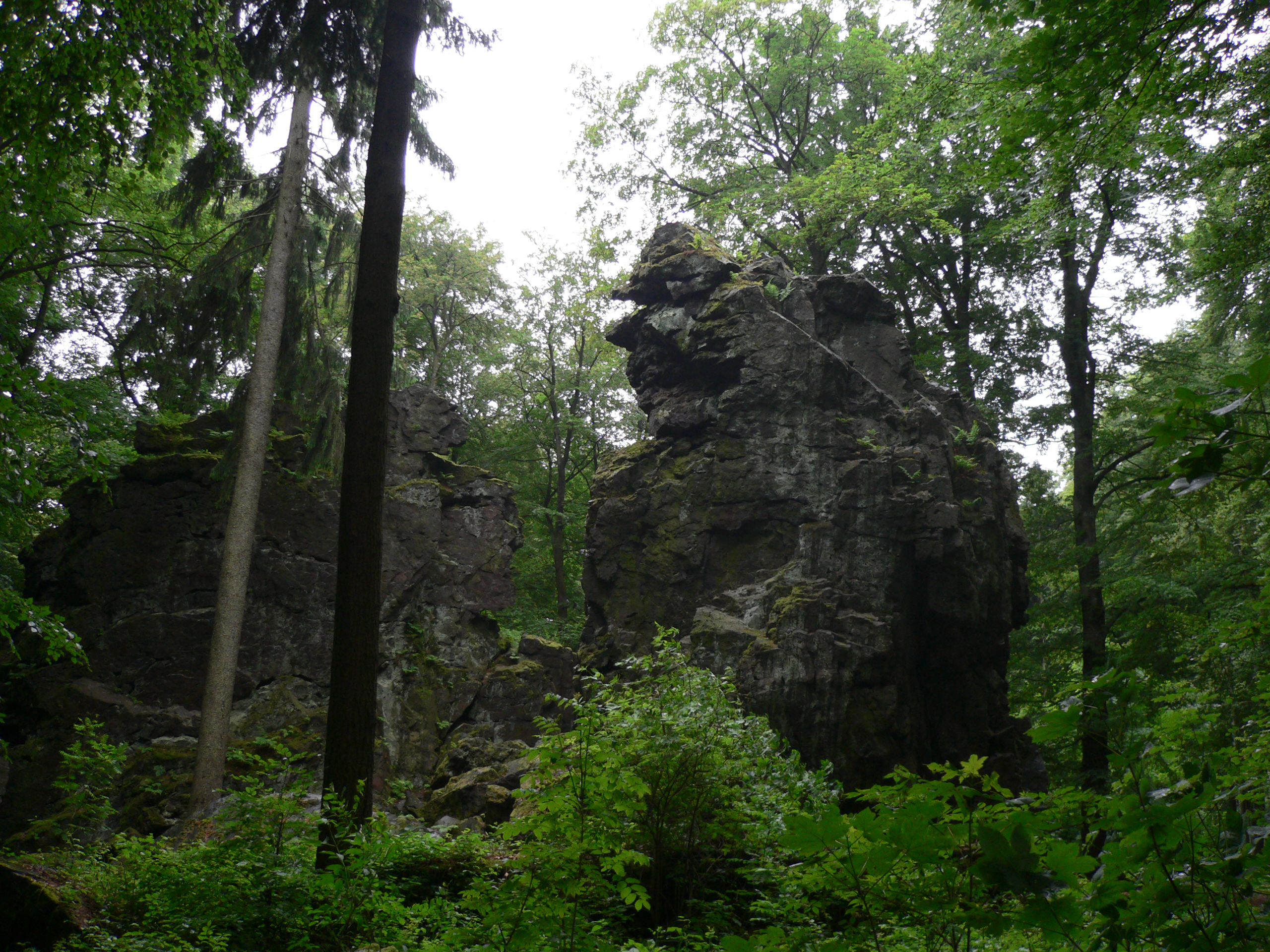 Wilhelmsteine, großes Gesichtsprofil am langen Stein